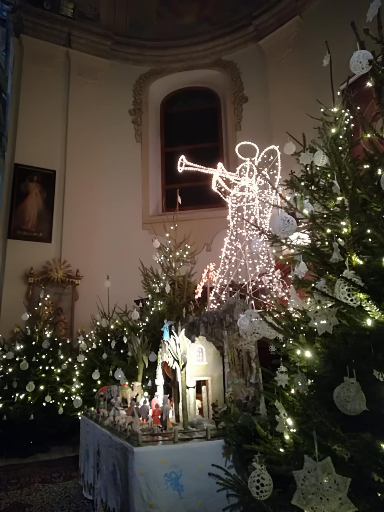 Bočná loď kostola s betlehemom